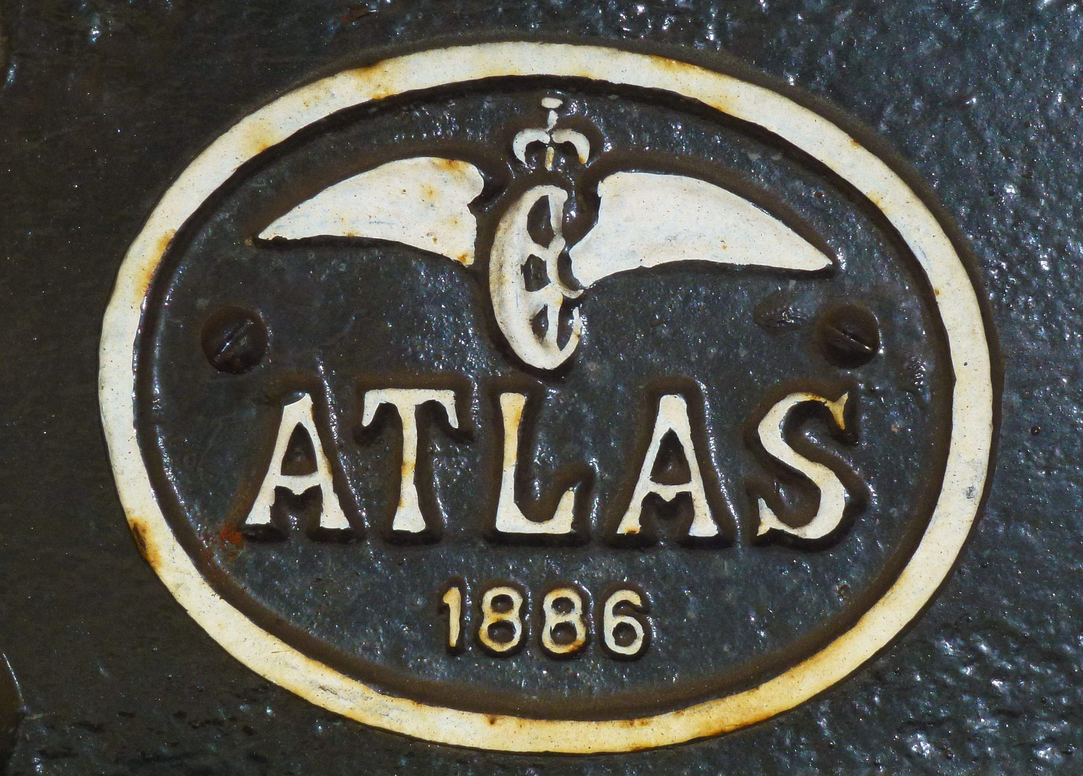 SRJ Co 26 skylt Atlas (Upsala–Lenna Jernväg)